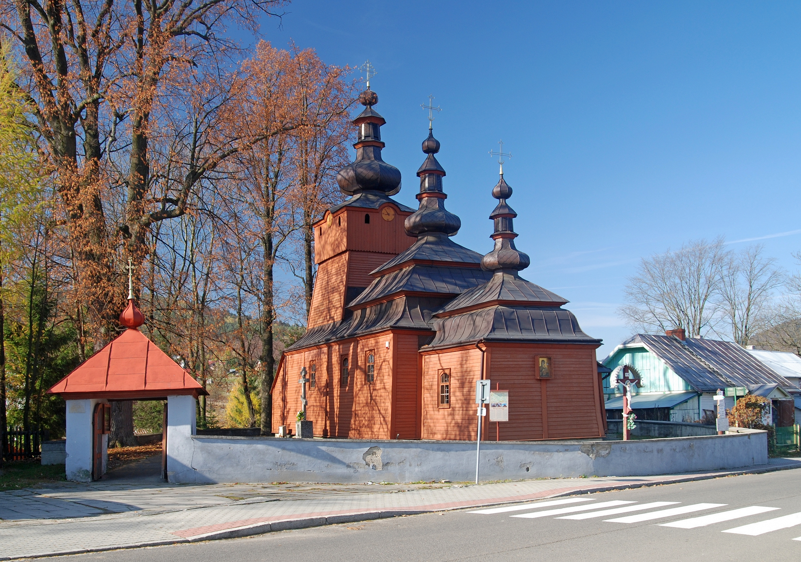 wieś Wysowa-Zdrój